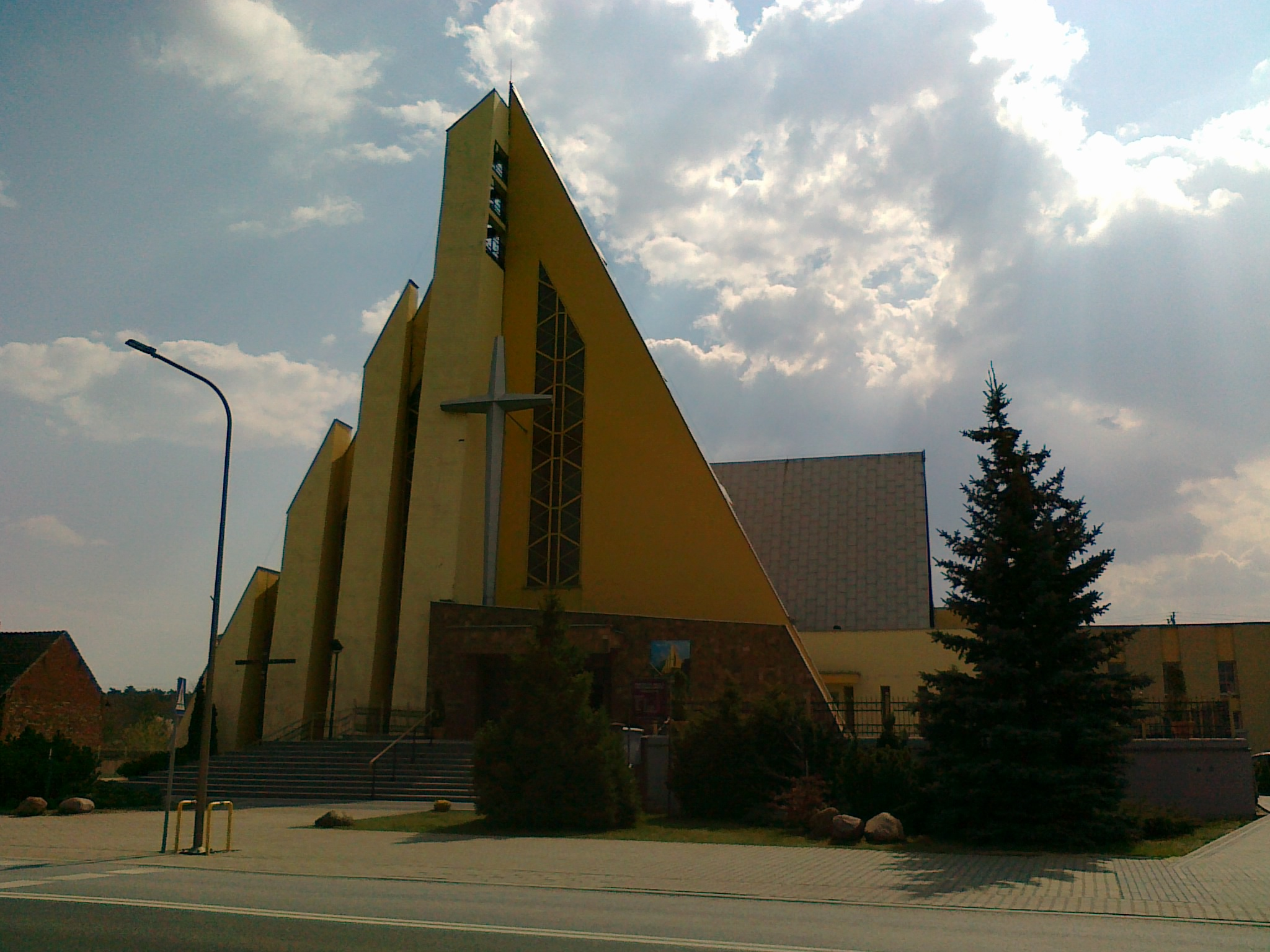 Kościół Świętego Piusa X Papieża i Świętej Marii Goretti w Kędzierzynie-Koźlu